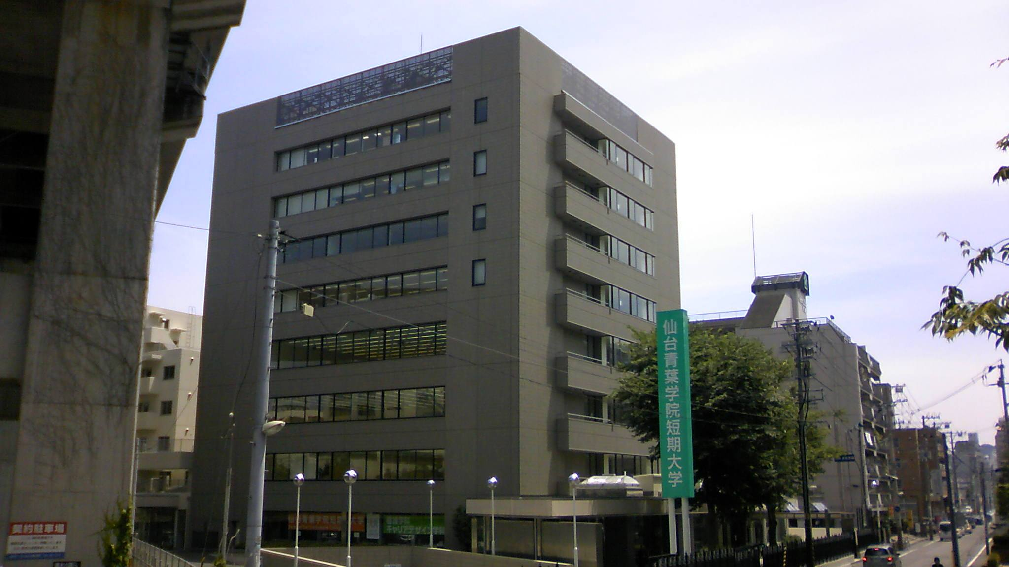 仙台青葉学院短期大学